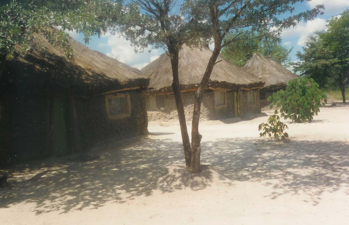 Een Duerf vun der UNITA (1989)